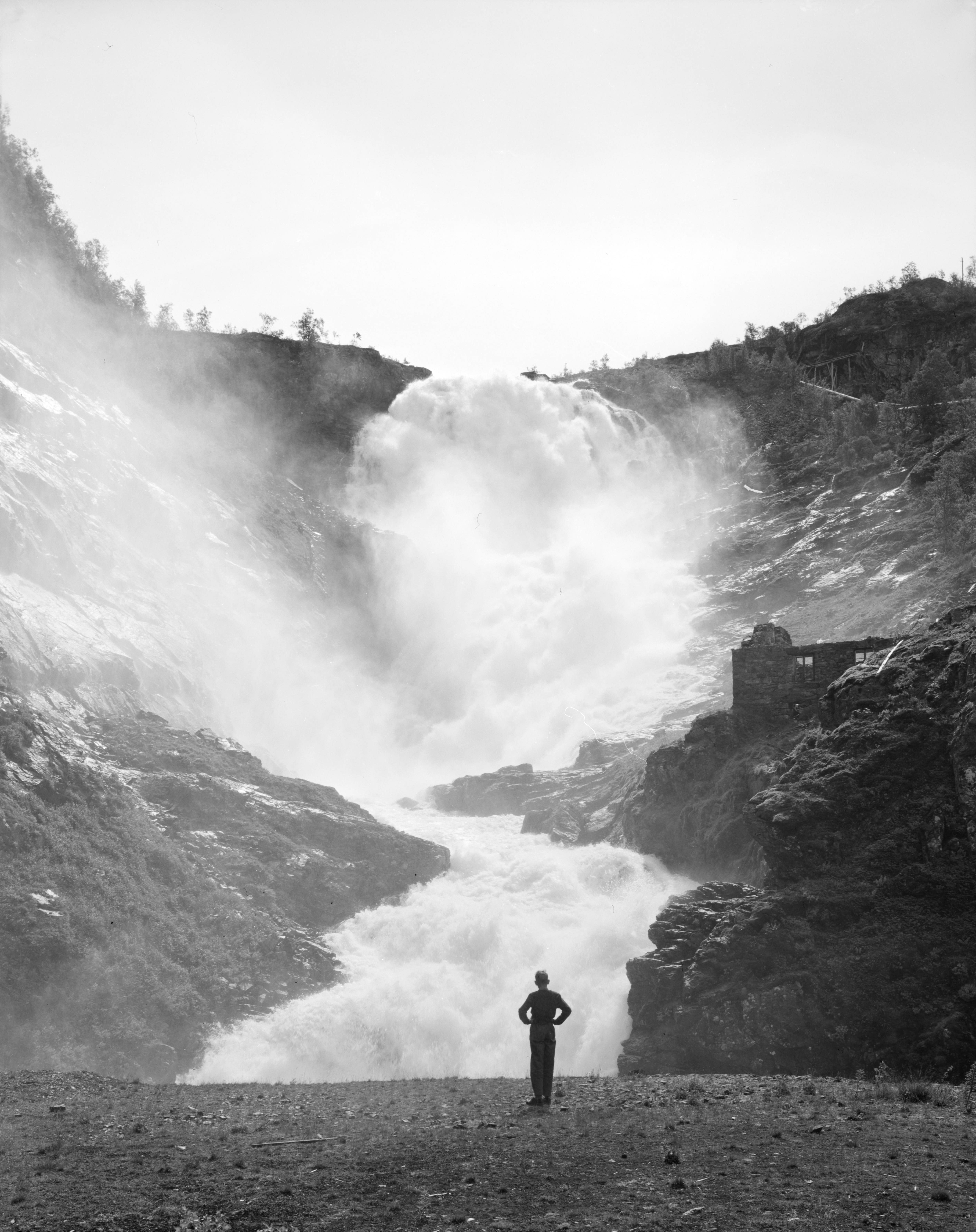 Bildet er hentet fra Nasjonalbibliotekets bildesamling. Anmerkninger til bildet var: fotograf: Å.M. Kjosfossen, Aurland, Sogn og Fjordane